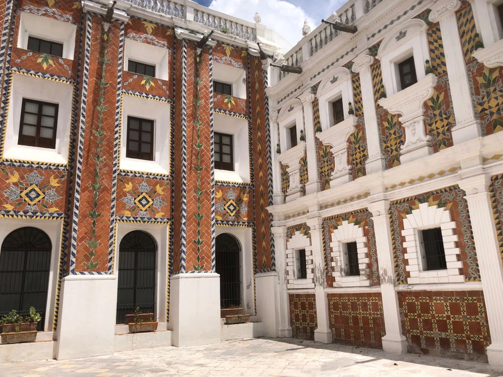 Vista del Patio de los Azulejos